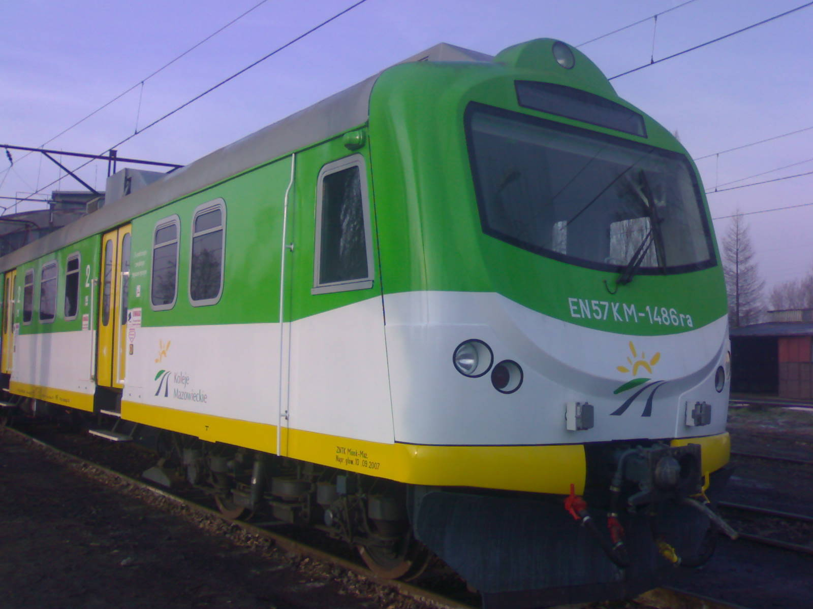 EN57 modernized electric multiple unit in Koleje Mazowieckie colours